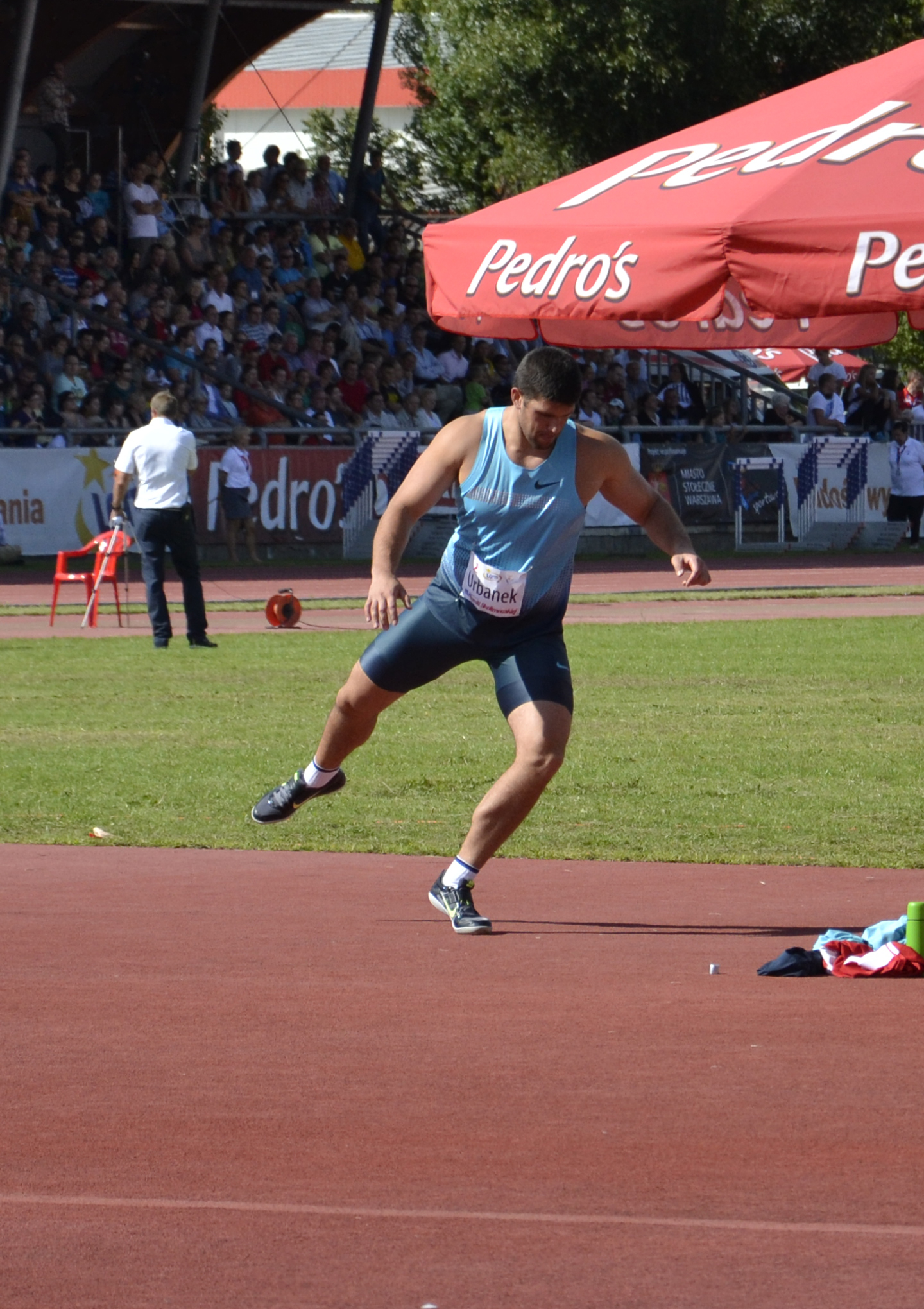 polski dyskobol Robert Urbanek na 4. Memoriale - Mityngu im. Kamili Skolimowskiej w Warszawie w czasie rozgrzewki